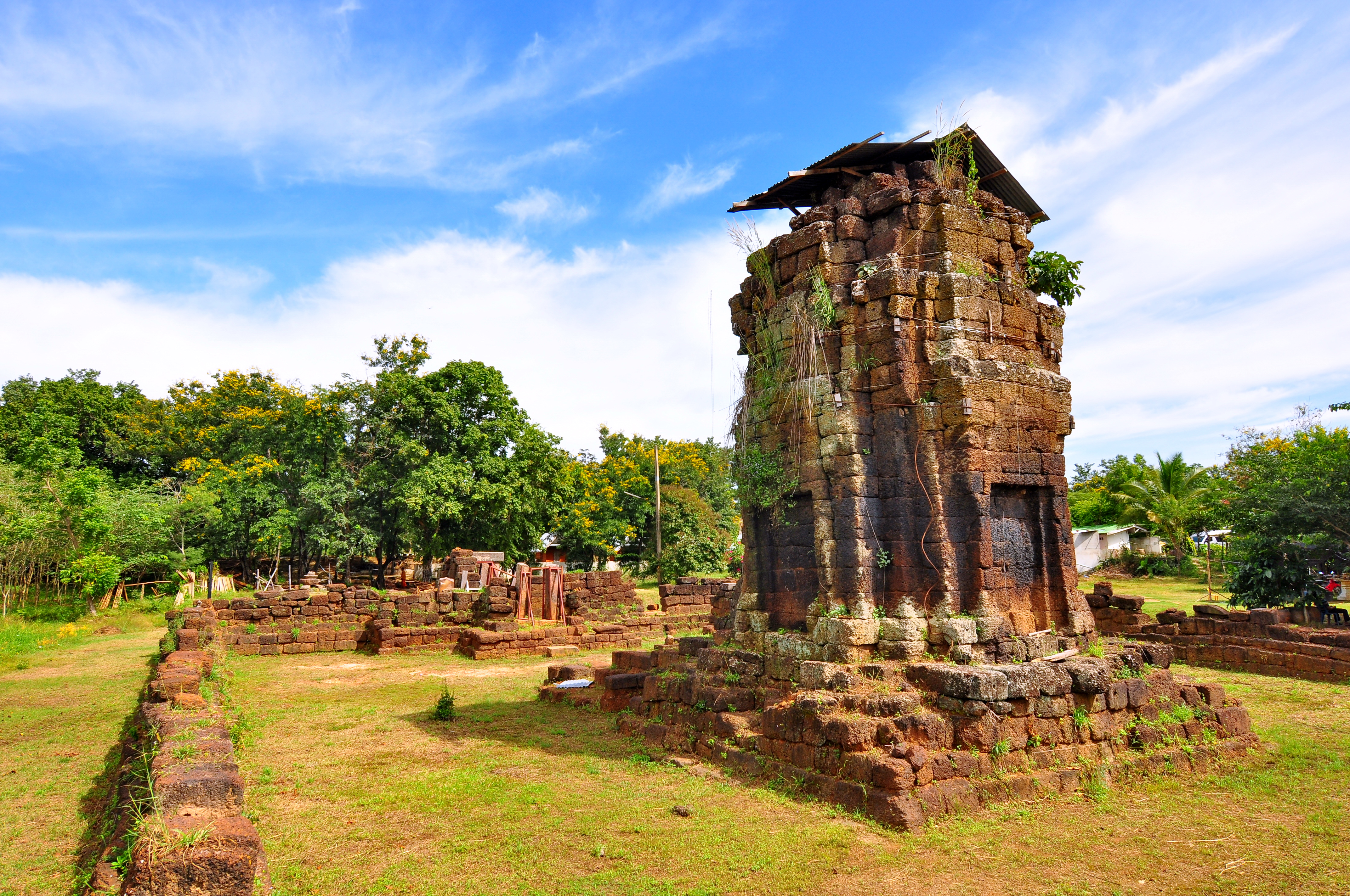 ปราสาทวัดโคกงิ้ว เป็นศาสนสถานประจำ "อโรคยาศาล" หรือโรงพยาบาลที่พระเจ้าชัยวรมันที่ 7 แห่งอาณาจักรขอมโบราณโปรดให้สร้างขึ้นเมื่อราว 800 ปีมาแล้ว ตัวโรงเรือนที่พักผู้ป่วยคงสร้างด้วยไม้และผุพังไปหมดแล้ว เหลือเพียงปราสาทศิลาแลงขนาดเล็กที่สร้างไว้เป็นที่ประดิษฐานรูปพระไภษัชยคุรุ (พระพุทธเจ้าองค์หนึ่งที่เป็นแพทย์ ตามความเชื่อของพุทธศาสนาแบบมหายาน)